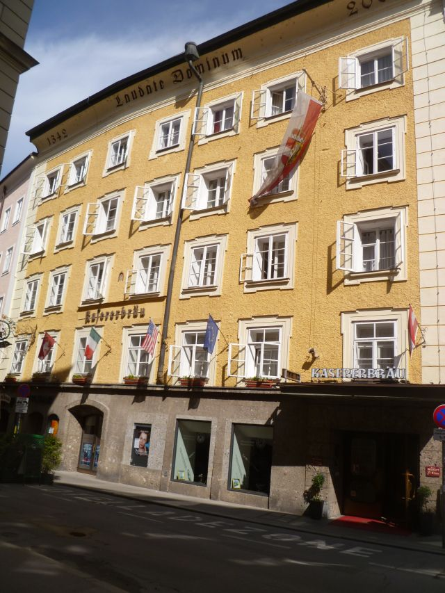 Kasererbräuhaus